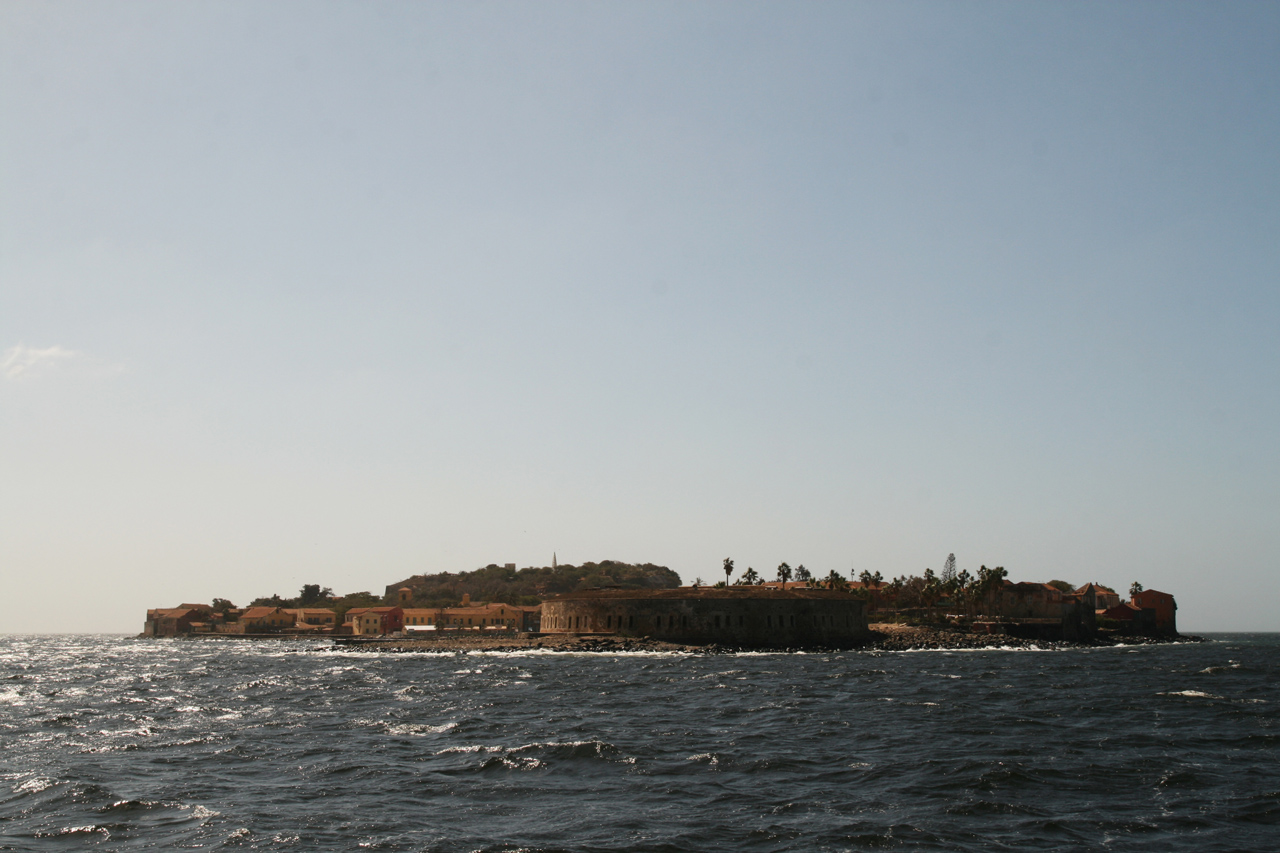 Gorée vue de la mer